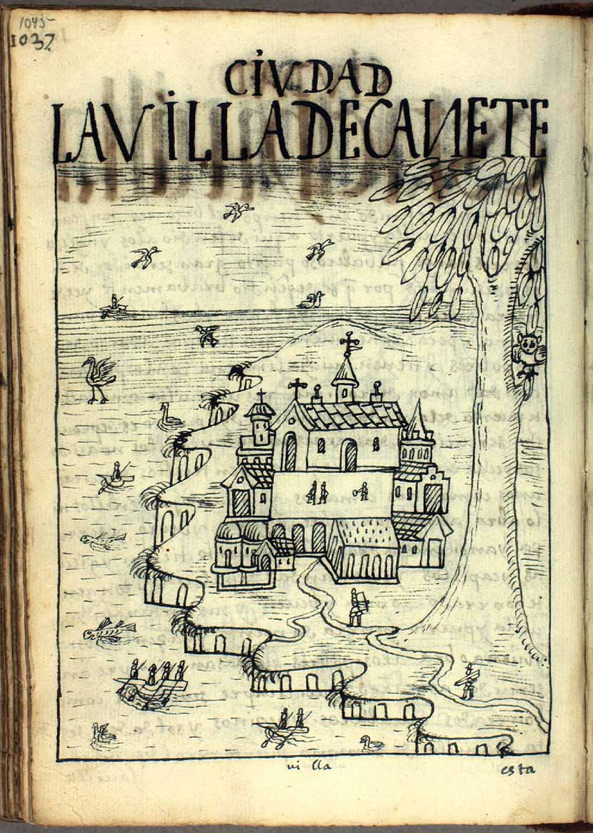 Dibujo 365. La villa de Cañete 1037 [1045] LA VILLA DE CAÑETE CIVDAD